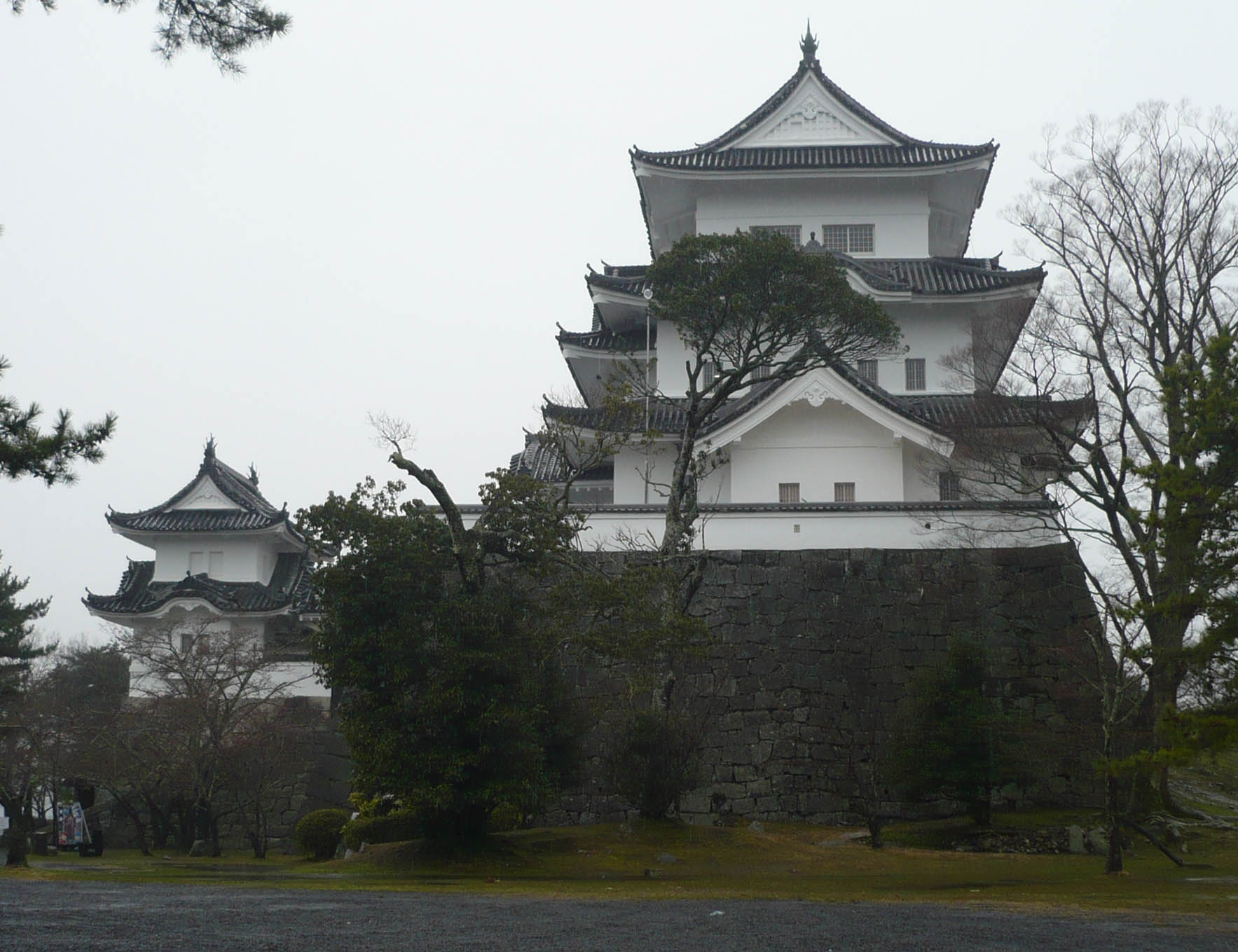 模擬大天守と小天守